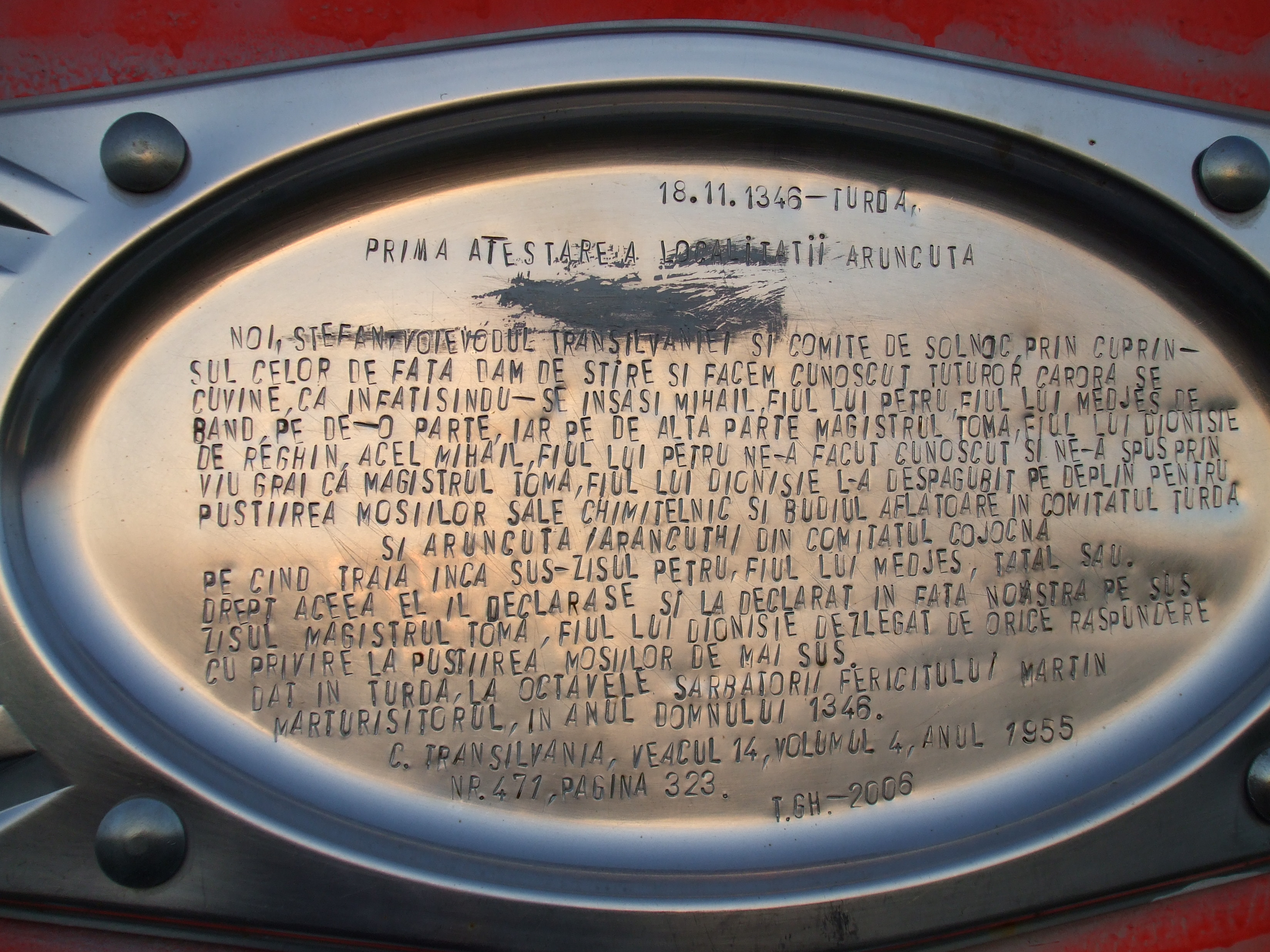 Imagini din Aruncuta (Sentinta Voievodului Transilvaniei din 1346,privind atestarea localitatii)